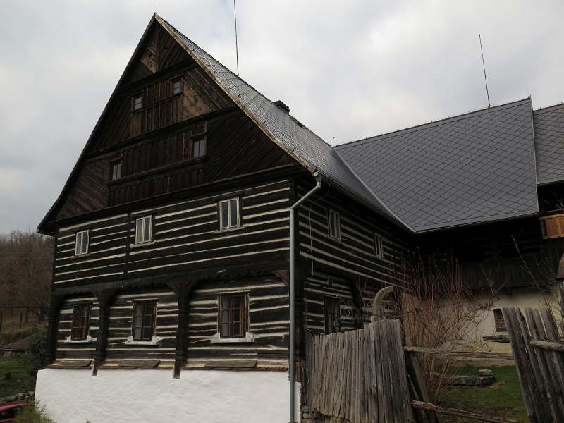 Usedlost čp. 9, Horní Chobolice 9, Horní Chobolice.